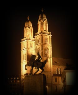 Zürich: Grossmünster church with Hans Waldmann monument